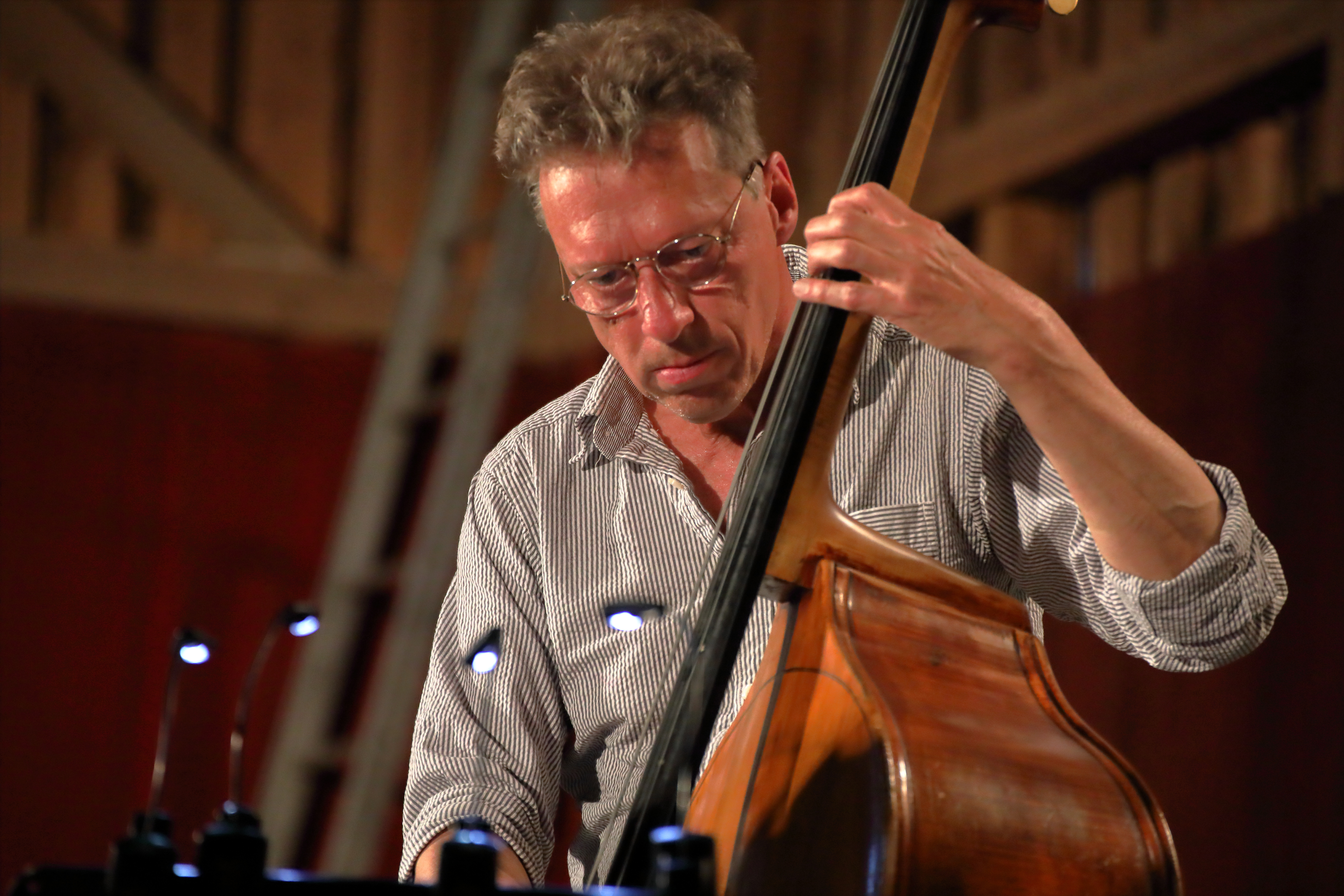 Ray Anderson (tb), Han Bennink (dr), Ernst Glerum (db) und Paul van Kemenade (alto sax) auf dem INNtöne Jazzfestival 2019.